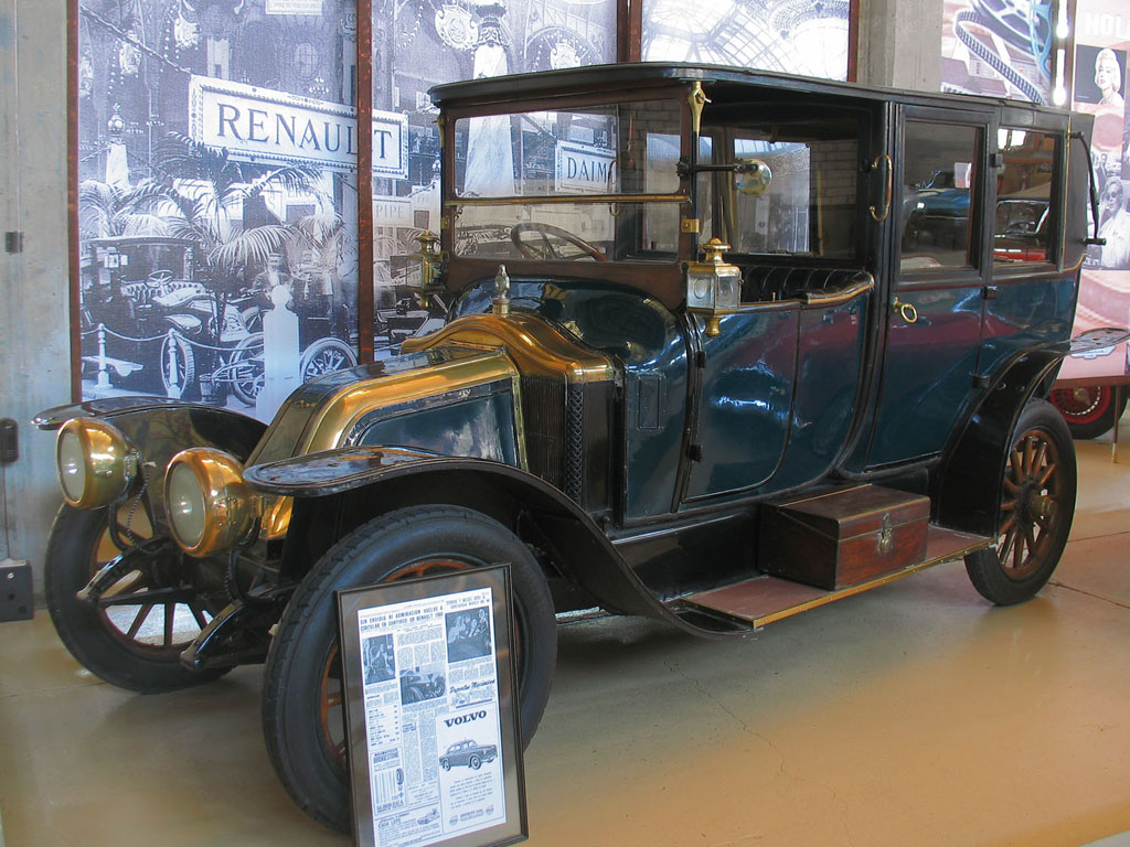 Renault Type EF 14-20 Landau 1908